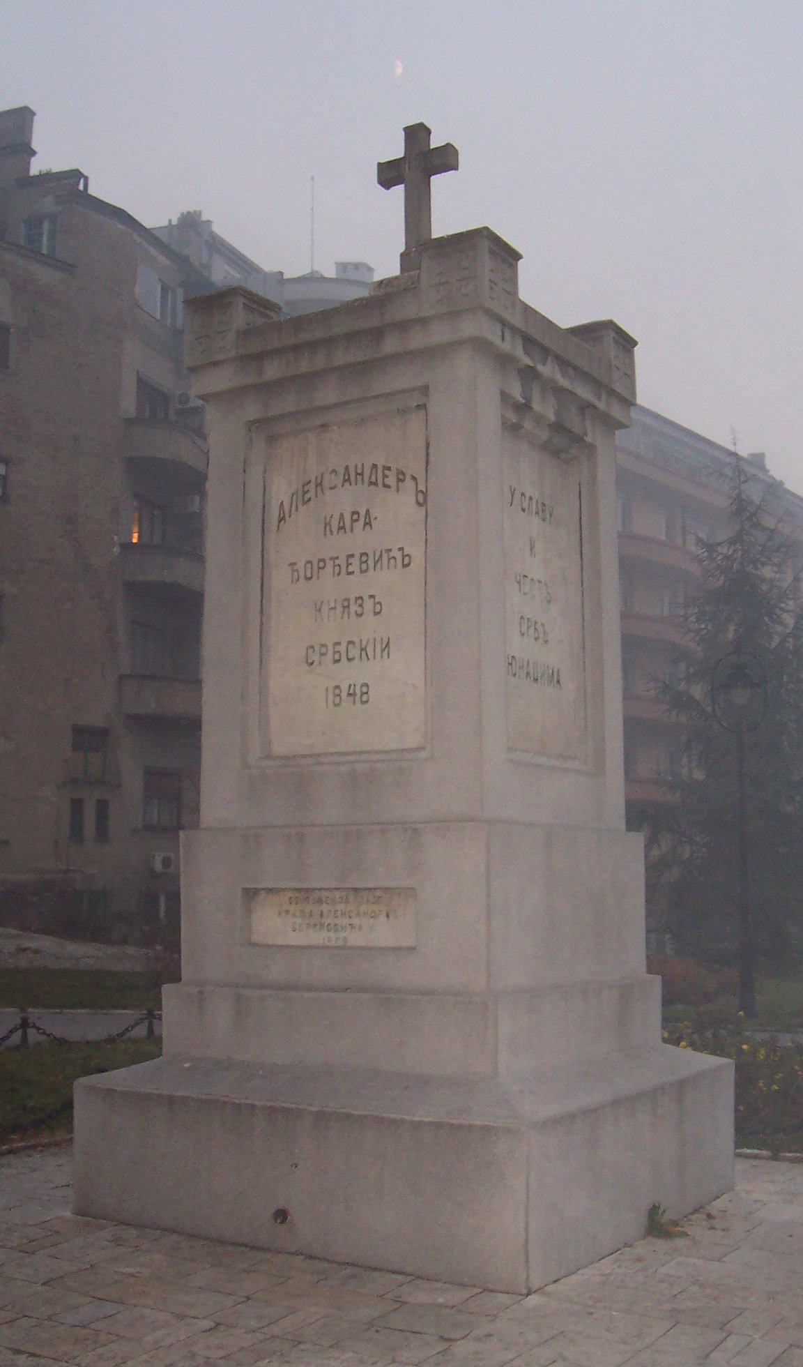 Monument to insurgents, the first modern monument in Serbia, in Karadjordje's park, Belgrade. The inscription on the monument (all four sides of it) says: У славу и честъ србъ юнацима за отечество храбро изгинув- шимъ 1806 године подиже споменикъ оваи Александеръ Кара- ђорђевић князъ србскіи 1848 Обновљен за владе краља Александра II Обреновића V. 1889